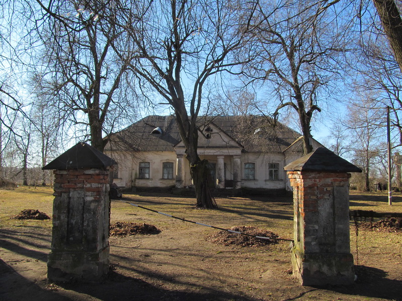 Стралкава. Сядзіба